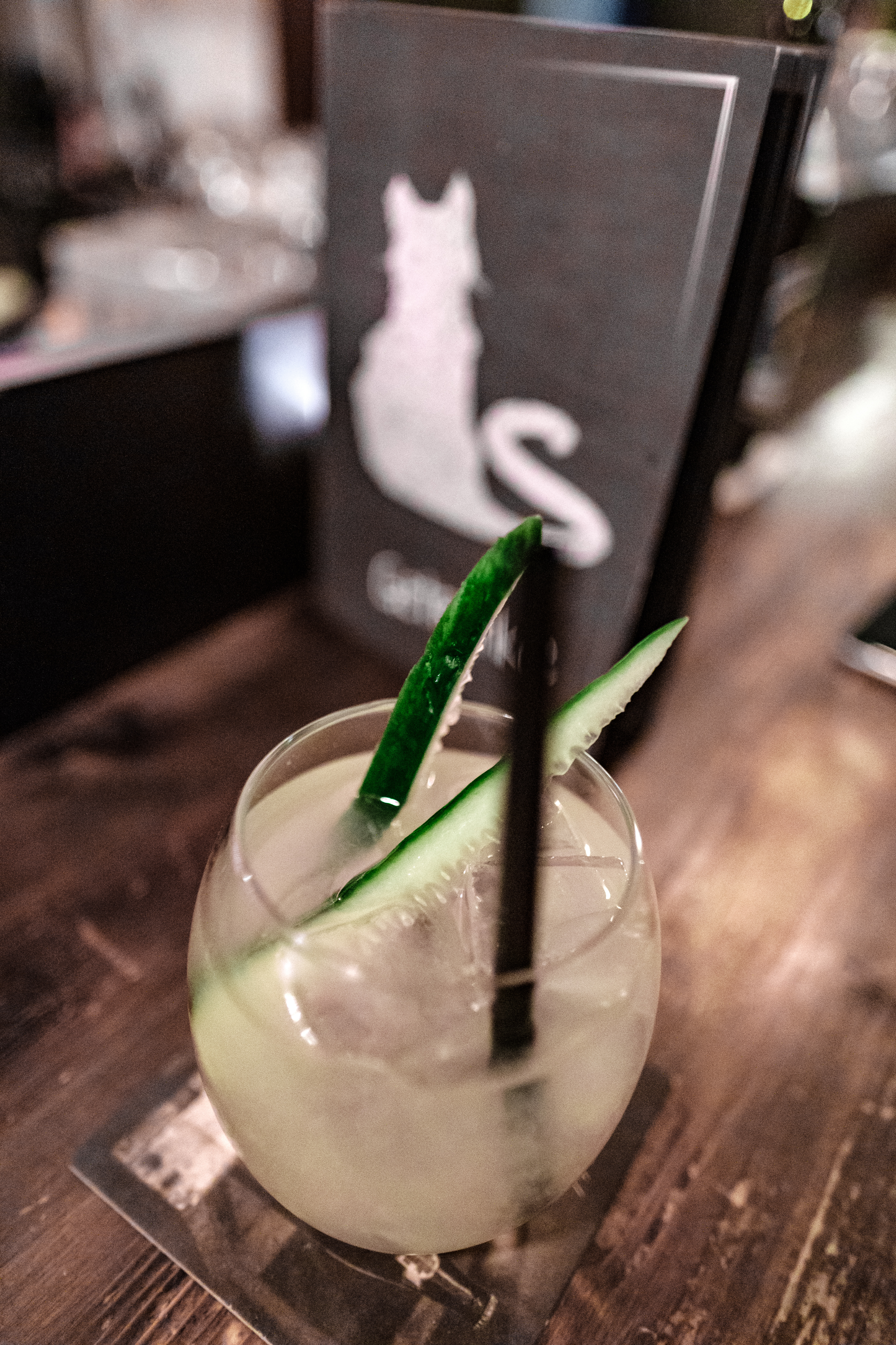 Moscow Mule in Schmitz Katze in Tübingen mit Getränkekarte